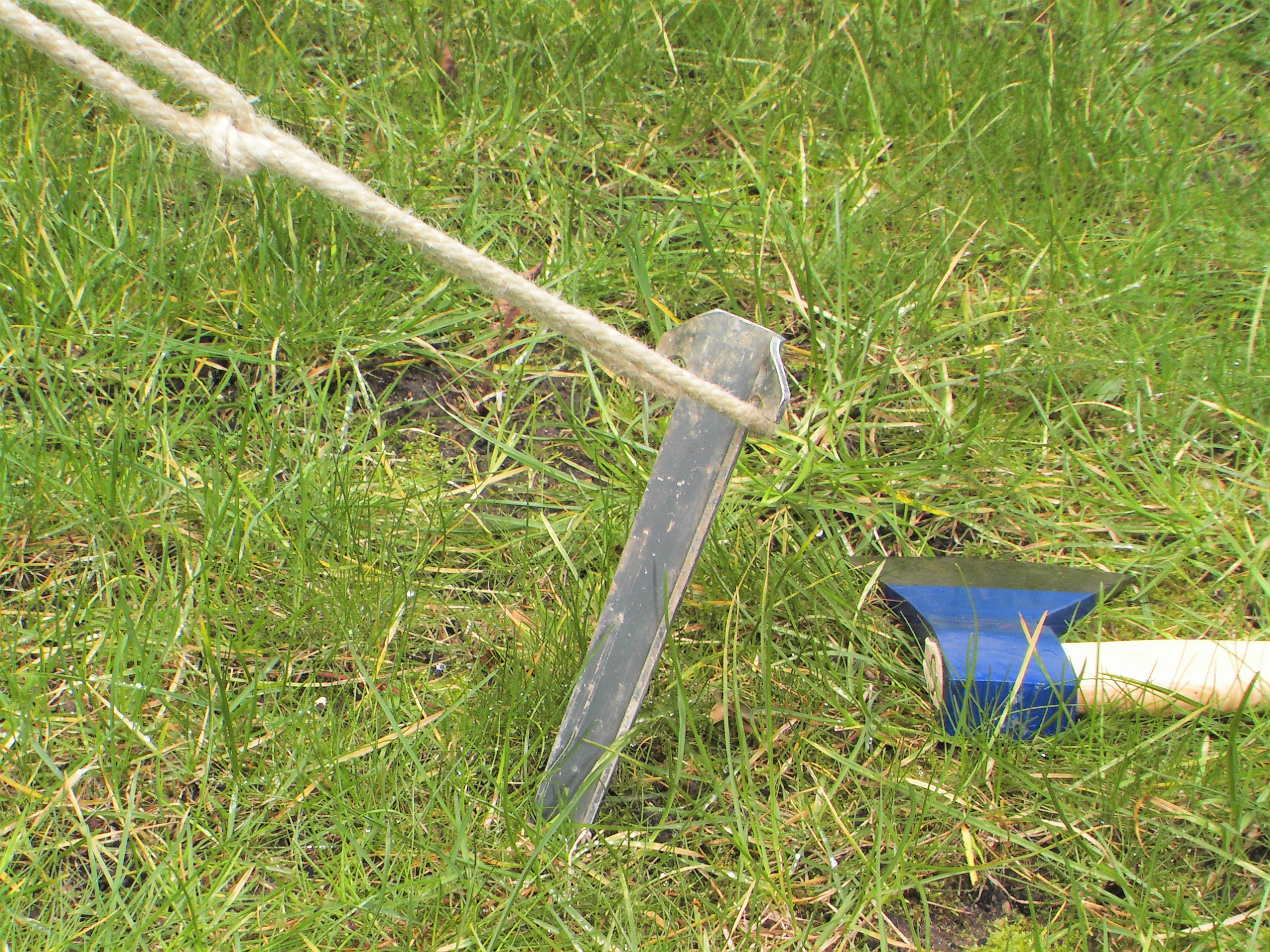 Halb in den Boden versenkter Hering